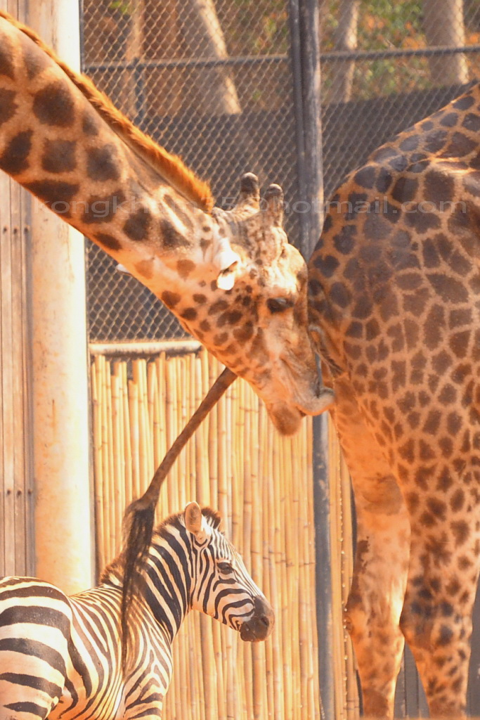 ยีราฟเพศผู้ทดสอบการเป็นสัดจากปัสสาวะของยีราฟเพสเมีย